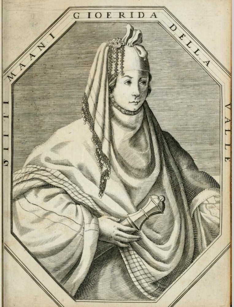 Посмертный портрет Ситти Маани Гиориды, первой жены Пьетро делла Валле. Выполнен с утерянного прижизненного портрета в полный рост.